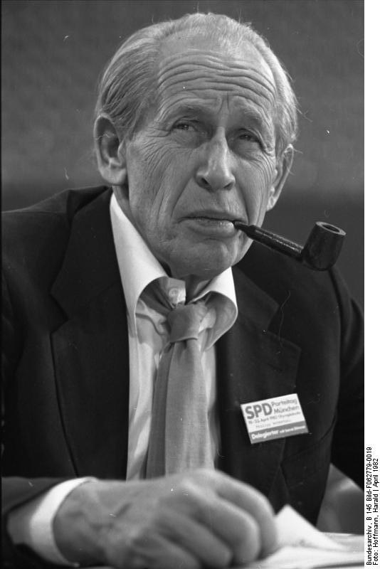 SPD-Parteitag in der Olympiahalle in München. 19.-23.04.82